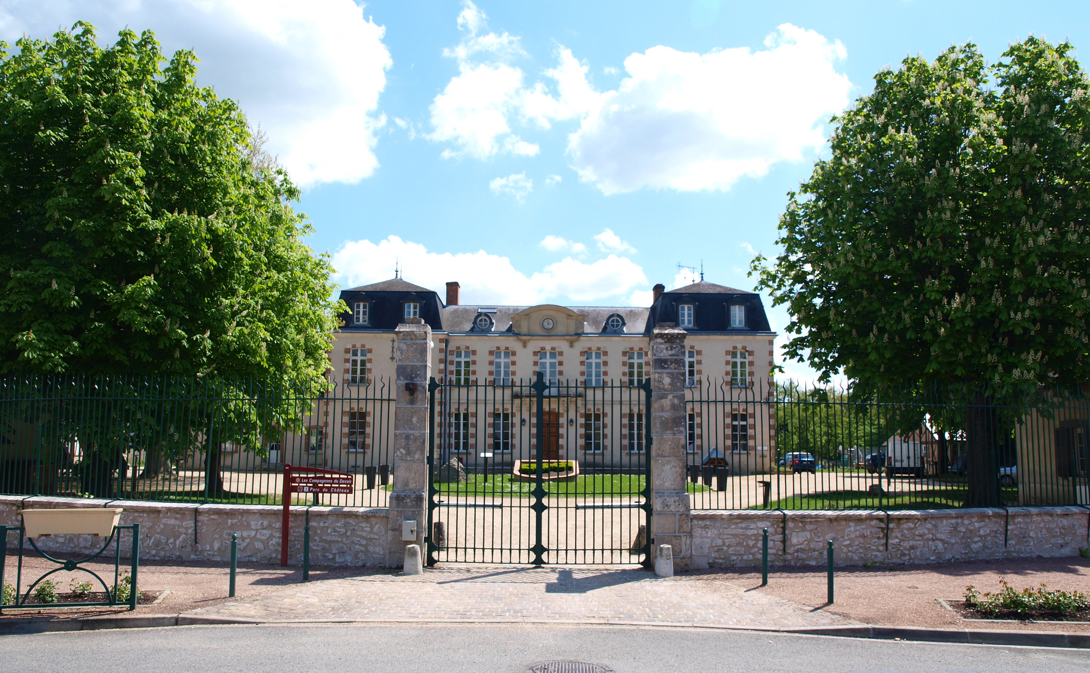 Cepoy (Loiret, France) , le château.